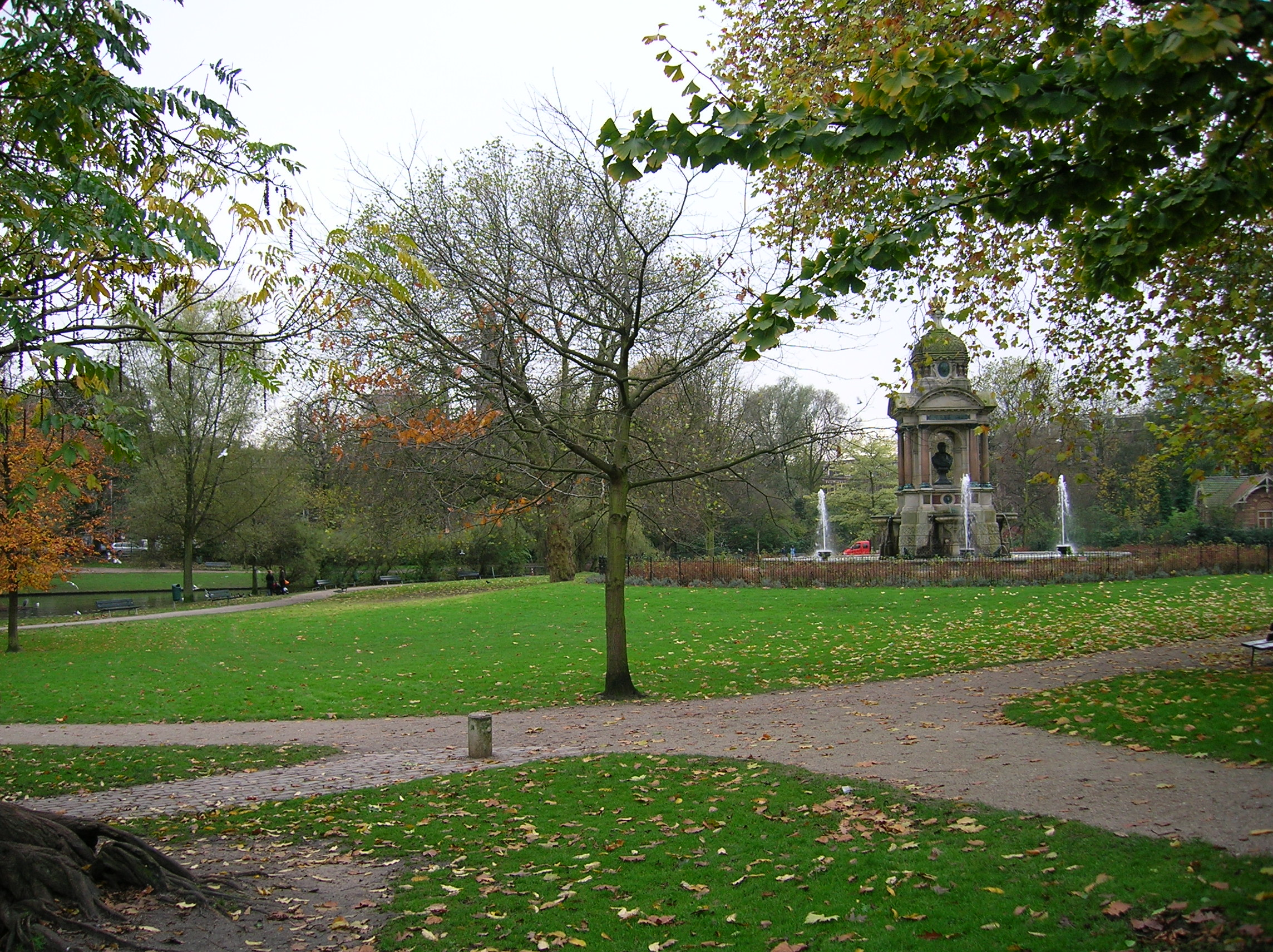 Het Sarphatipark in Amsterdam (De Pijp). Rechts in beeld het Sarphati-monument. Foto genomen op 22 november 2005 door SanderK.